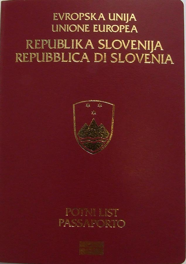 Slovenian Passport